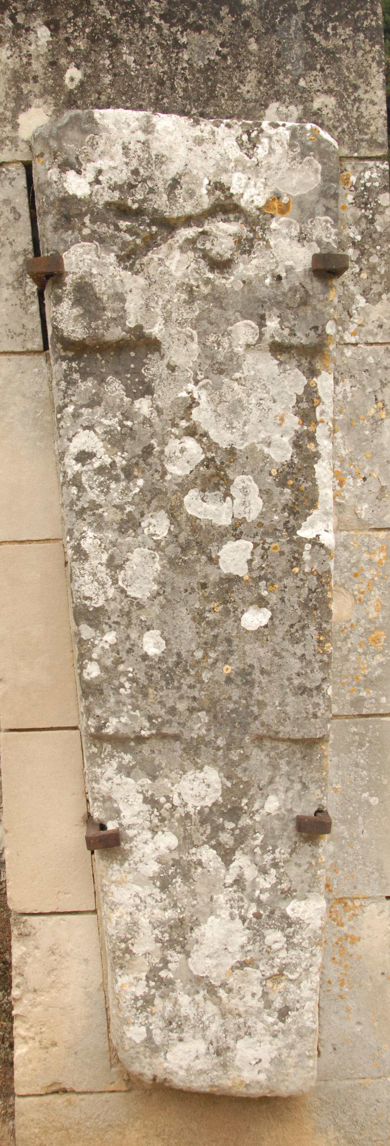 Gravur, Fisch (oben)